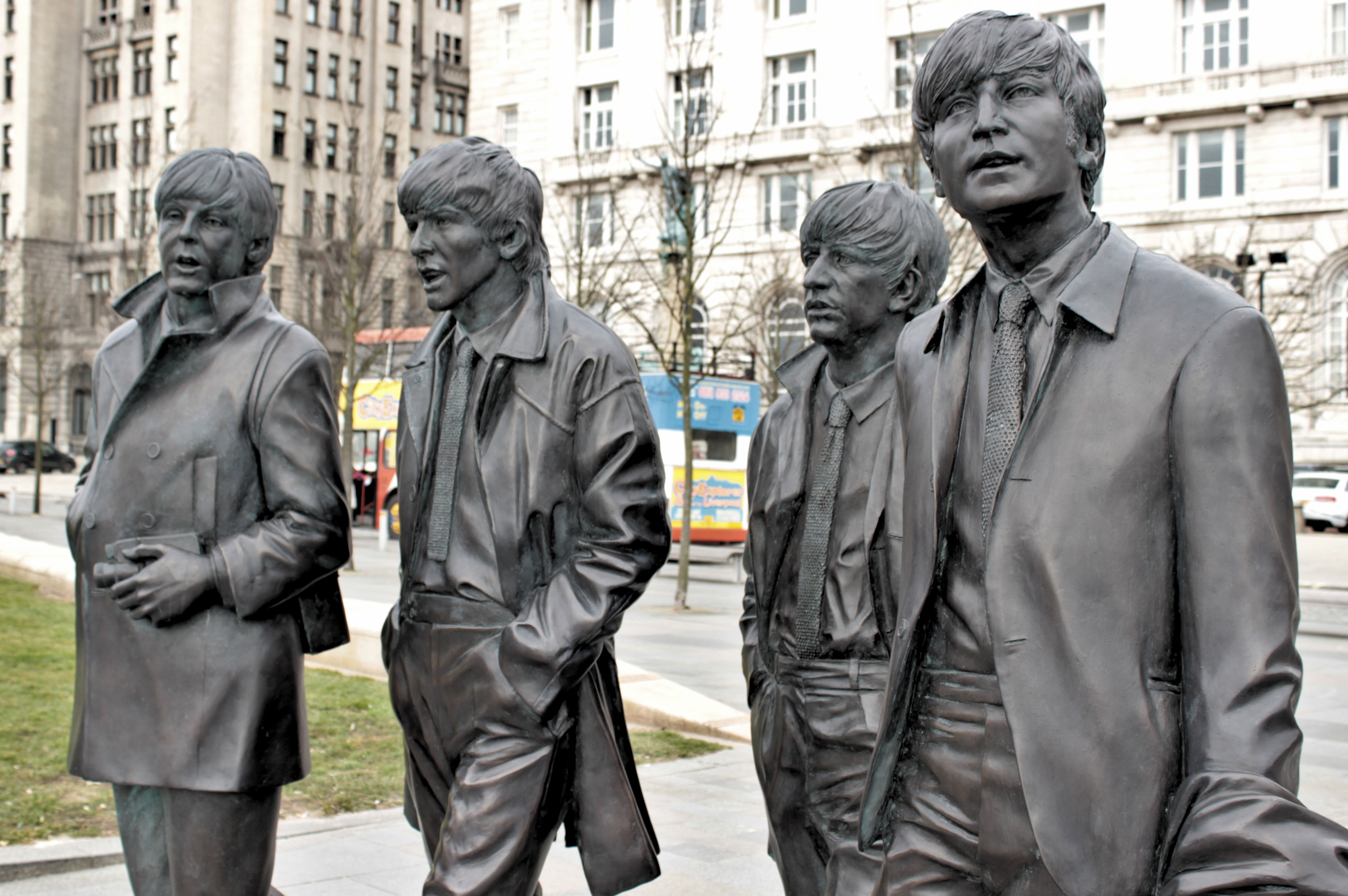 Escultura de The Beatles en Liverpool en Pier Head, hecha por Andy Edwards en conmemoración de los 50 años de su último concierto en la ciudad, en diciembre de 1965. Está inspirada en una fotografía tomada en 1963